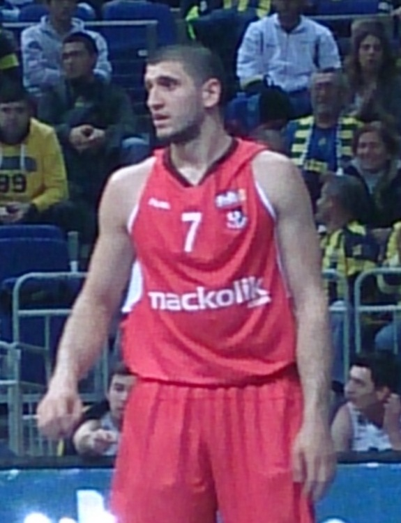 Orhan Aydin Haciyeva